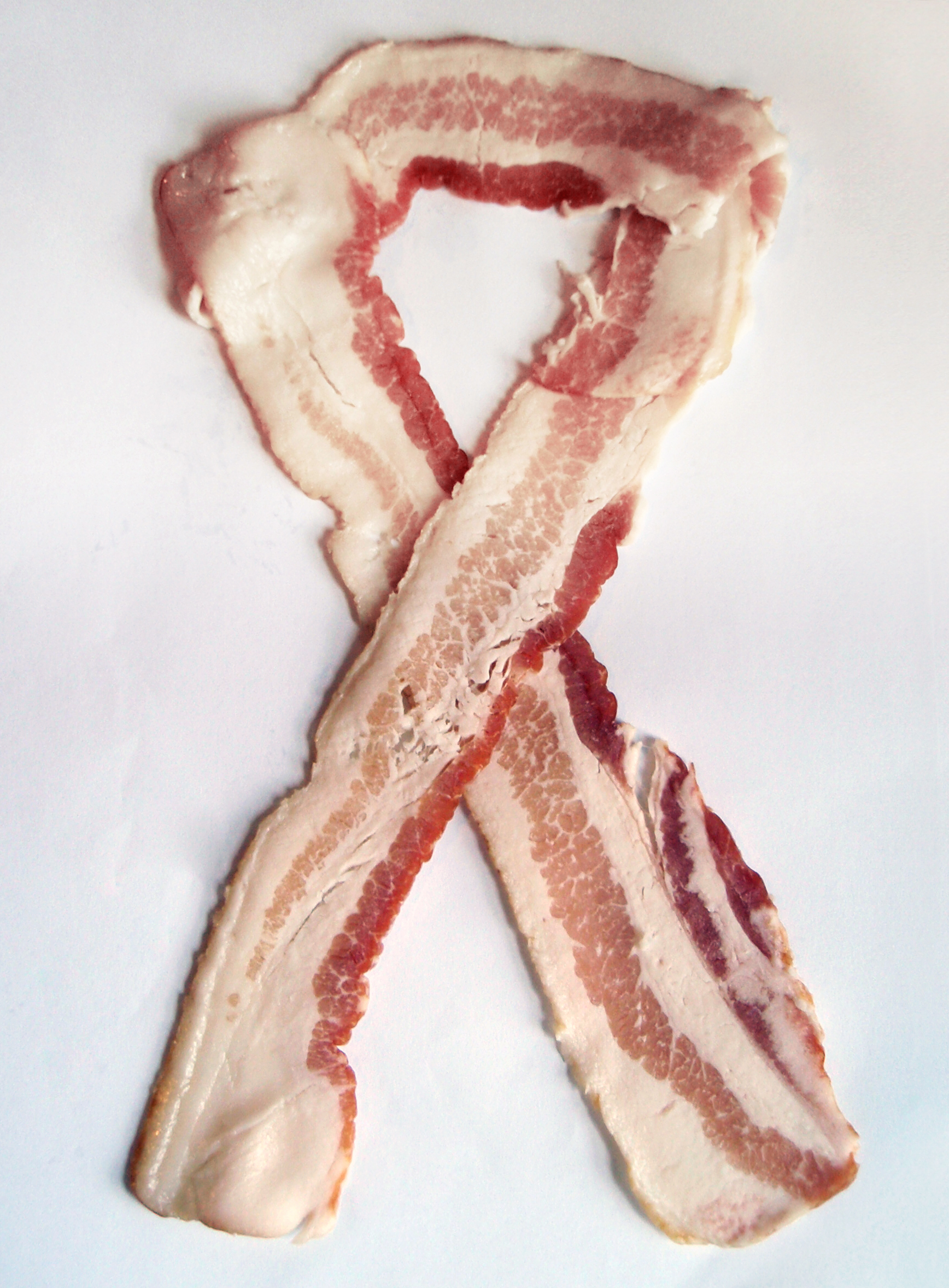 Bacon remembrance ribbon